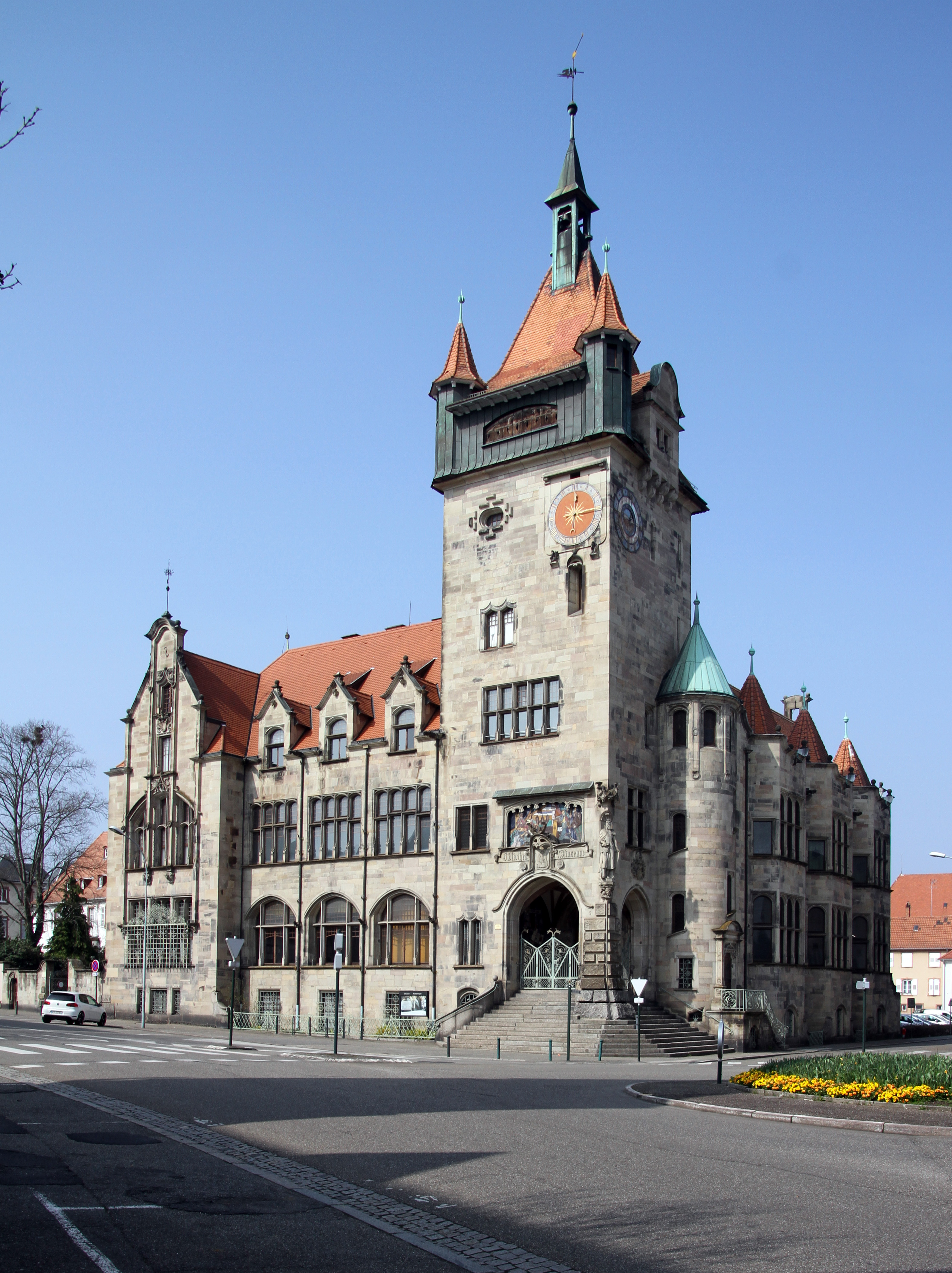 Historisches Museum